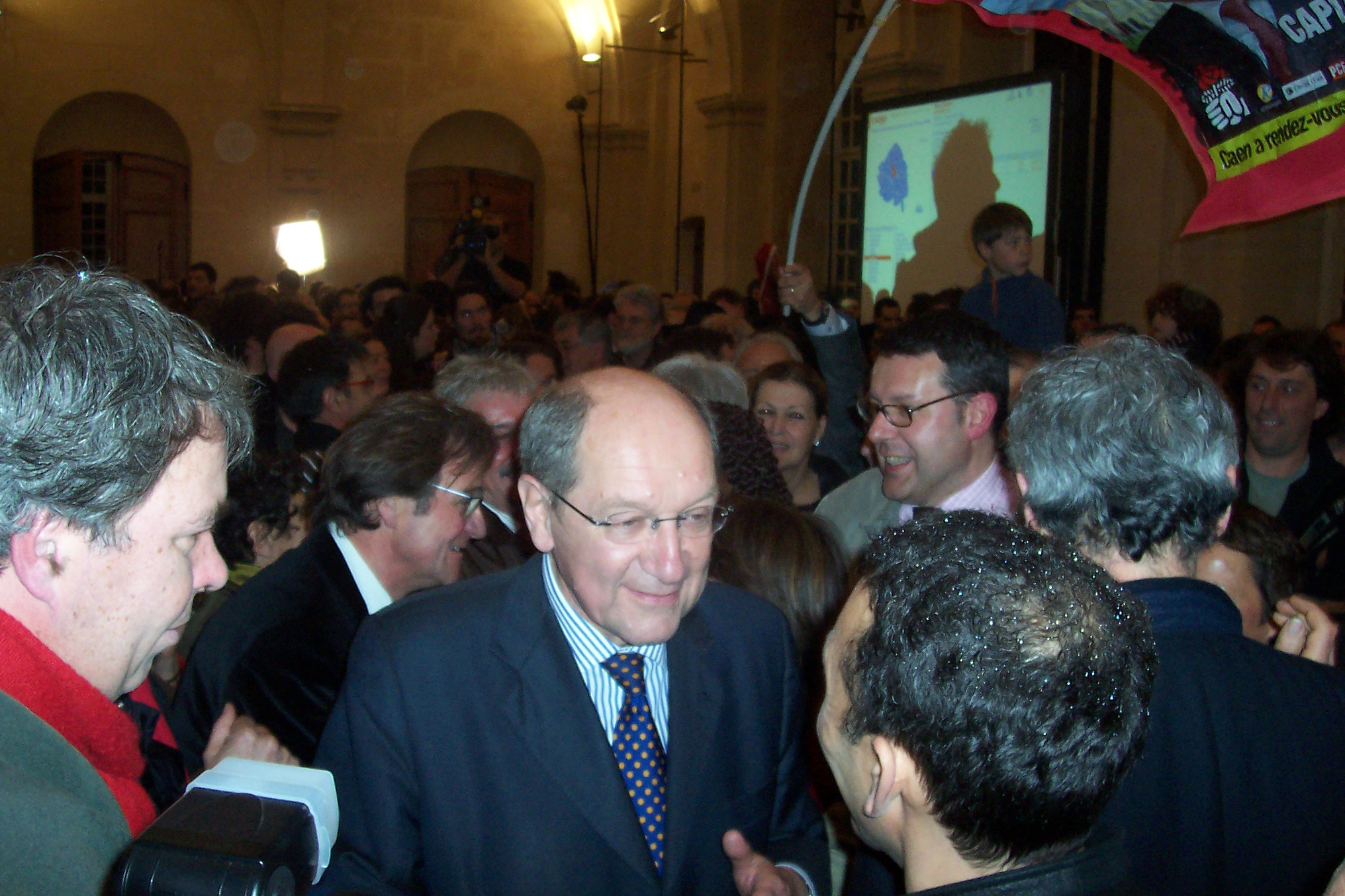 Philippe Duron à l'hôtel de ville de Caen après l'annonce de son élection à la mairie de Caen